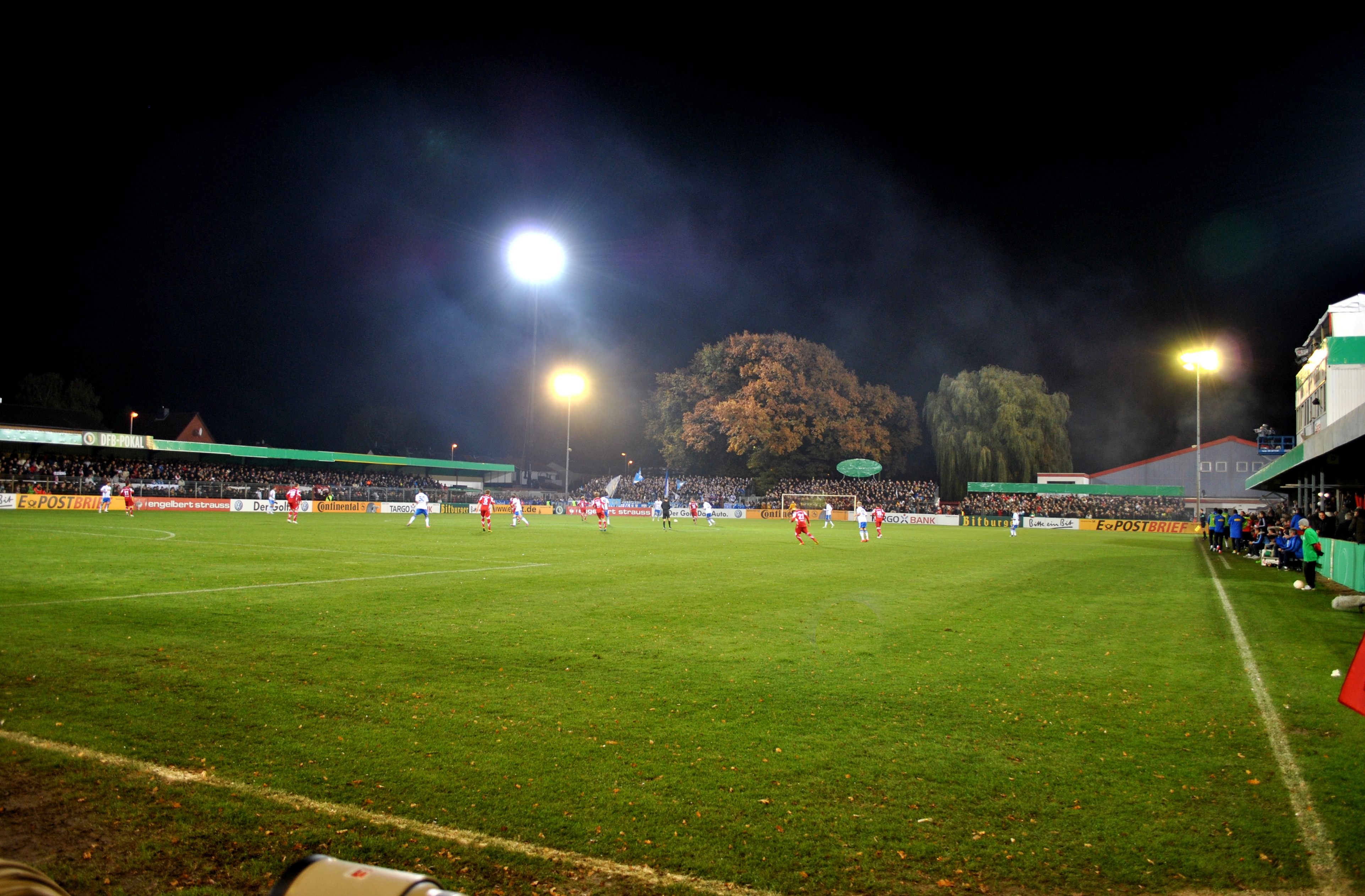 Wilhelm-Langrehr-Stadion während des DFB-Pokalspiels TSV Havelse - VfL Bochum in der Saison 2012/13.